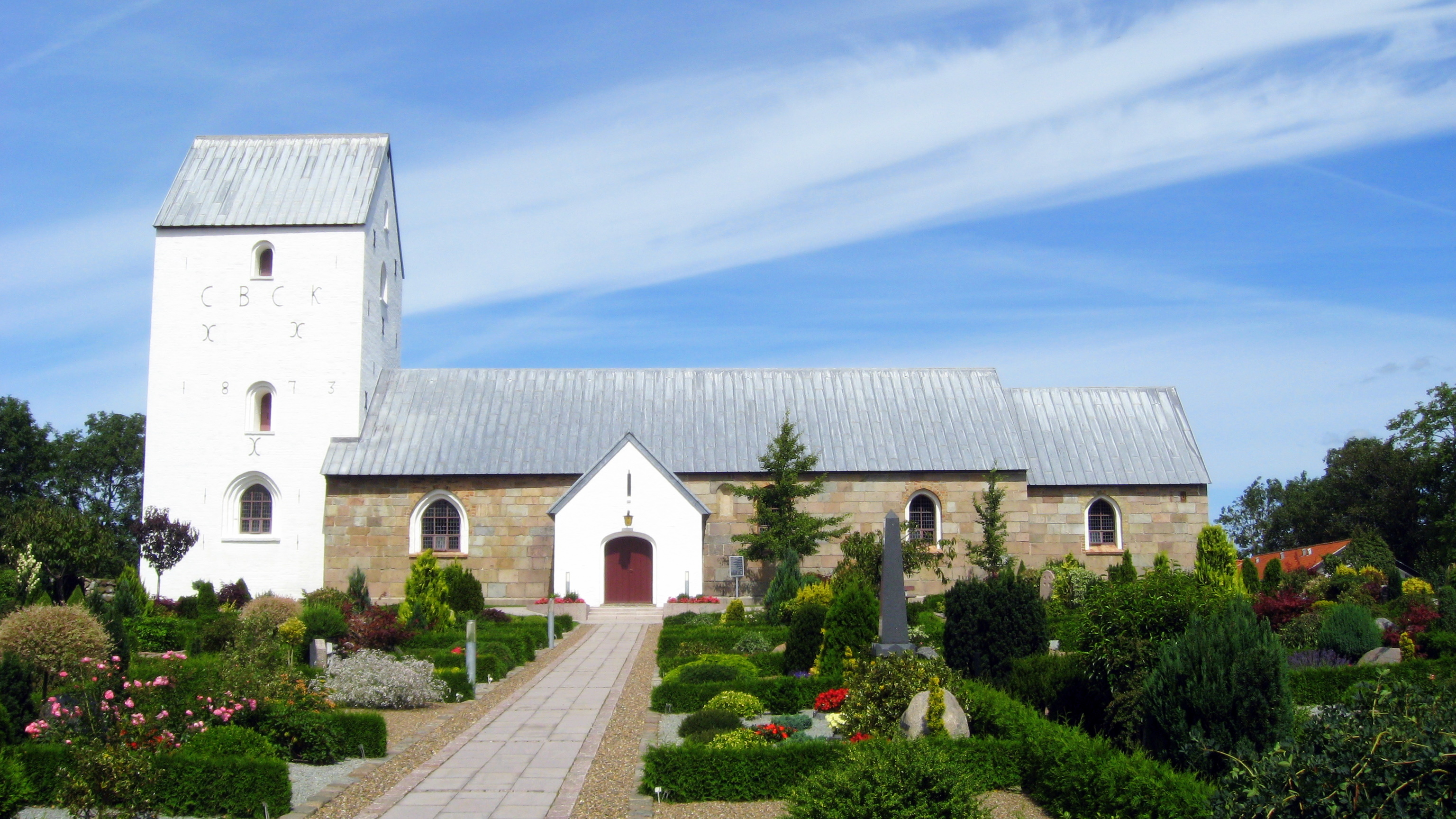 Gjøl Kirke, Jammerbugt Kommune